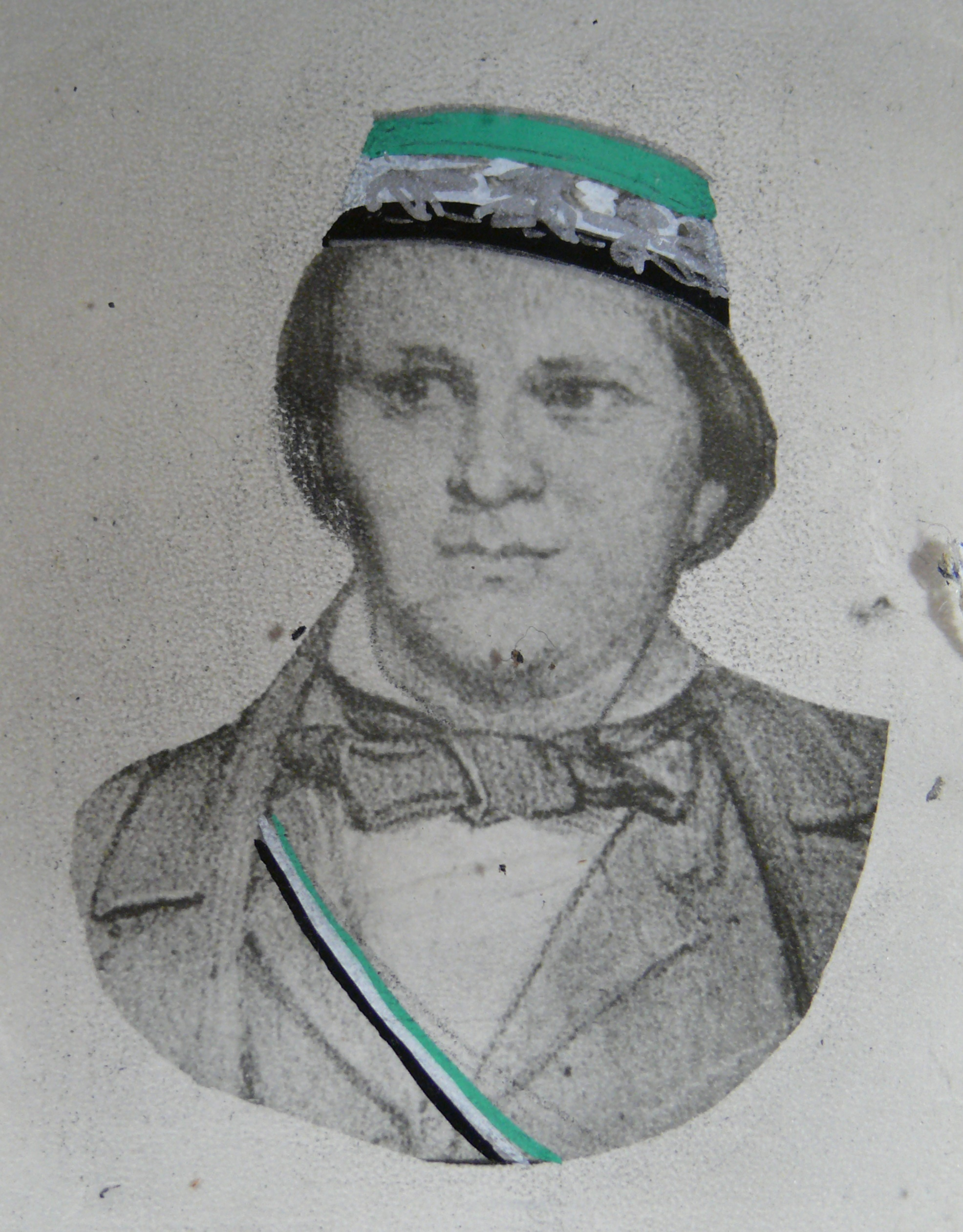 Silhouette von Franz Freiherr Schenk von Stauffenberg (1834-1901)